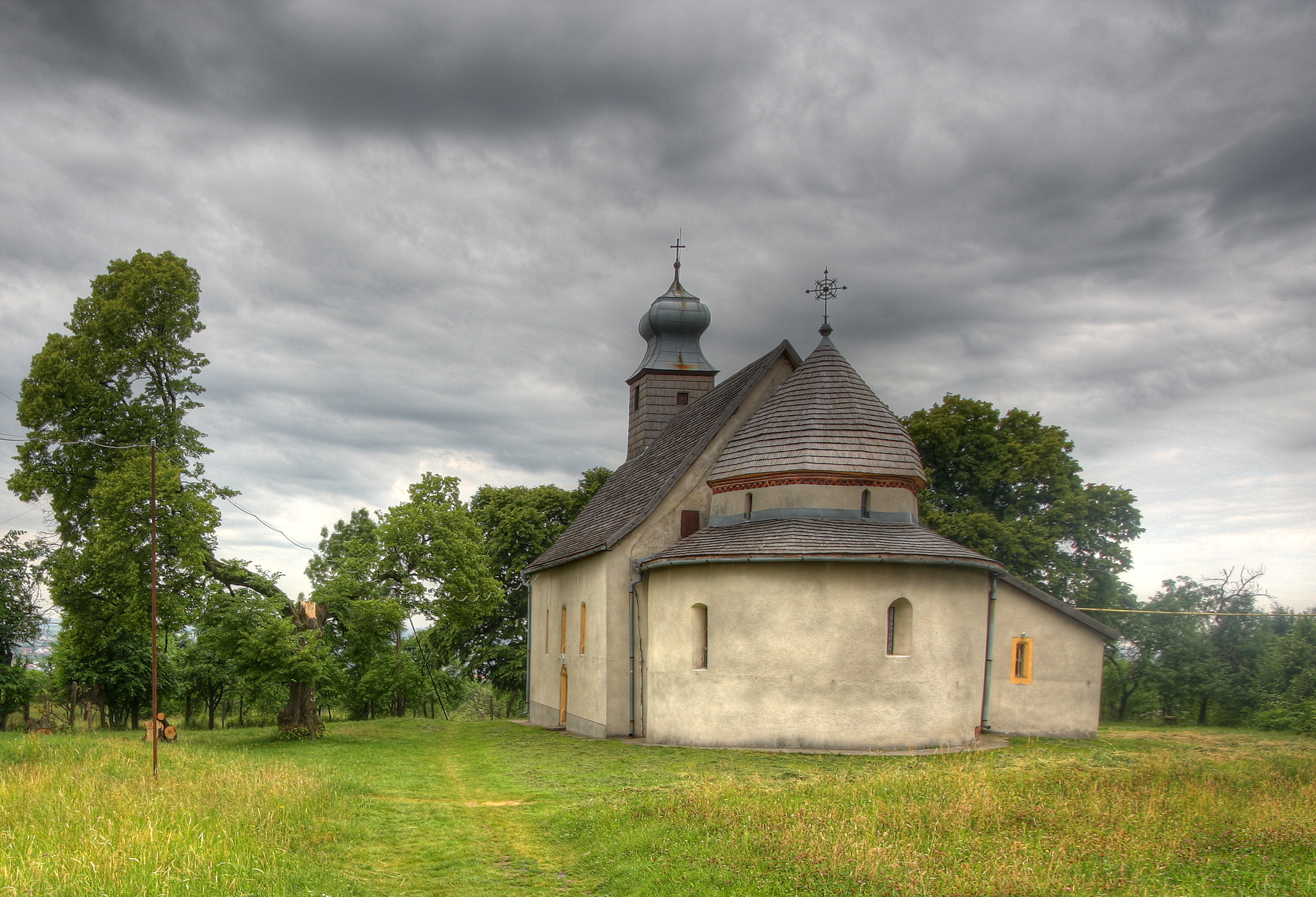 Горянська ротонда, церва Св. Анни, Ужгород